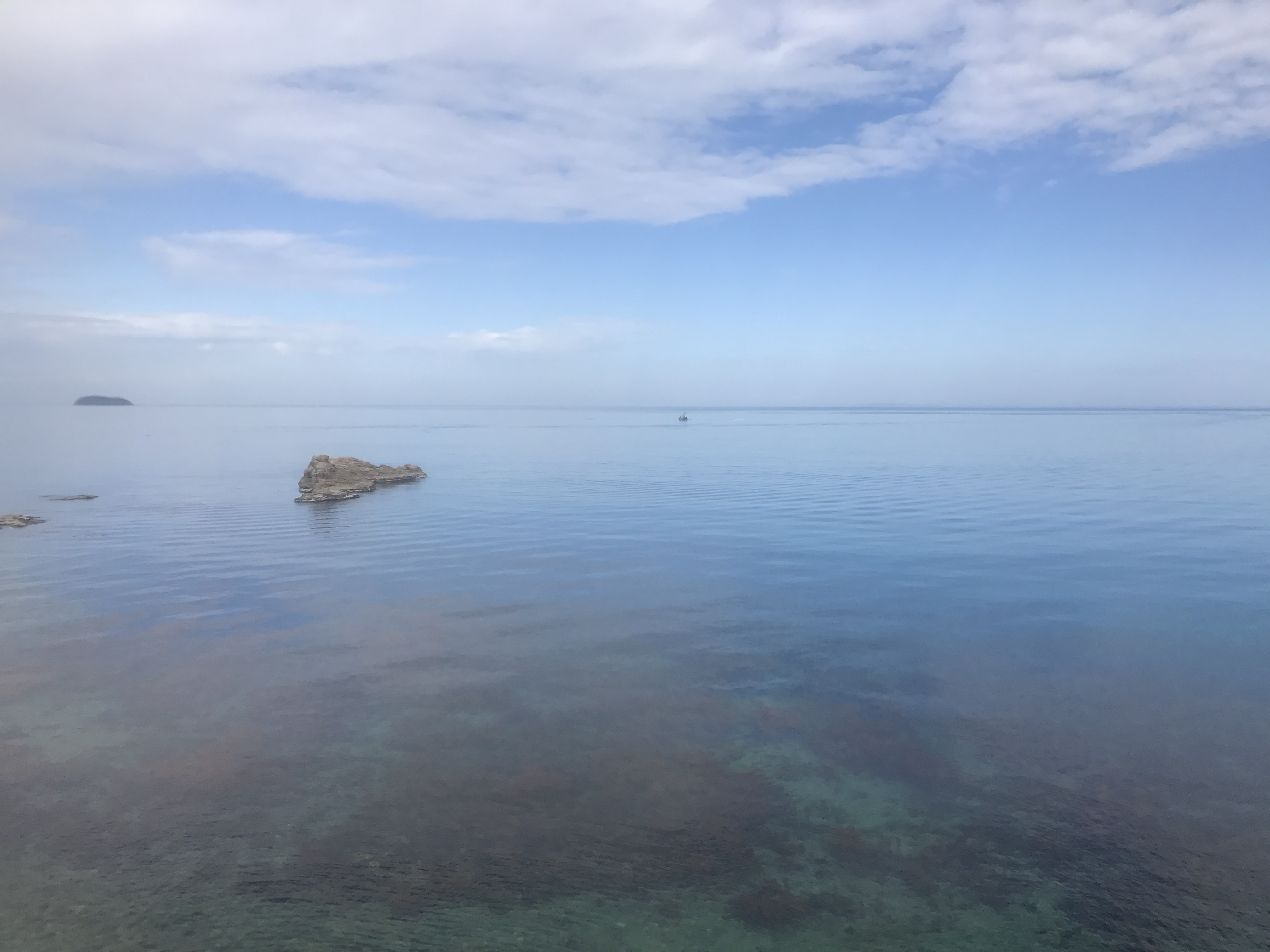 惣郷川橋梁を渡る山陰本線列車内より望む日本海。左側は宇田島